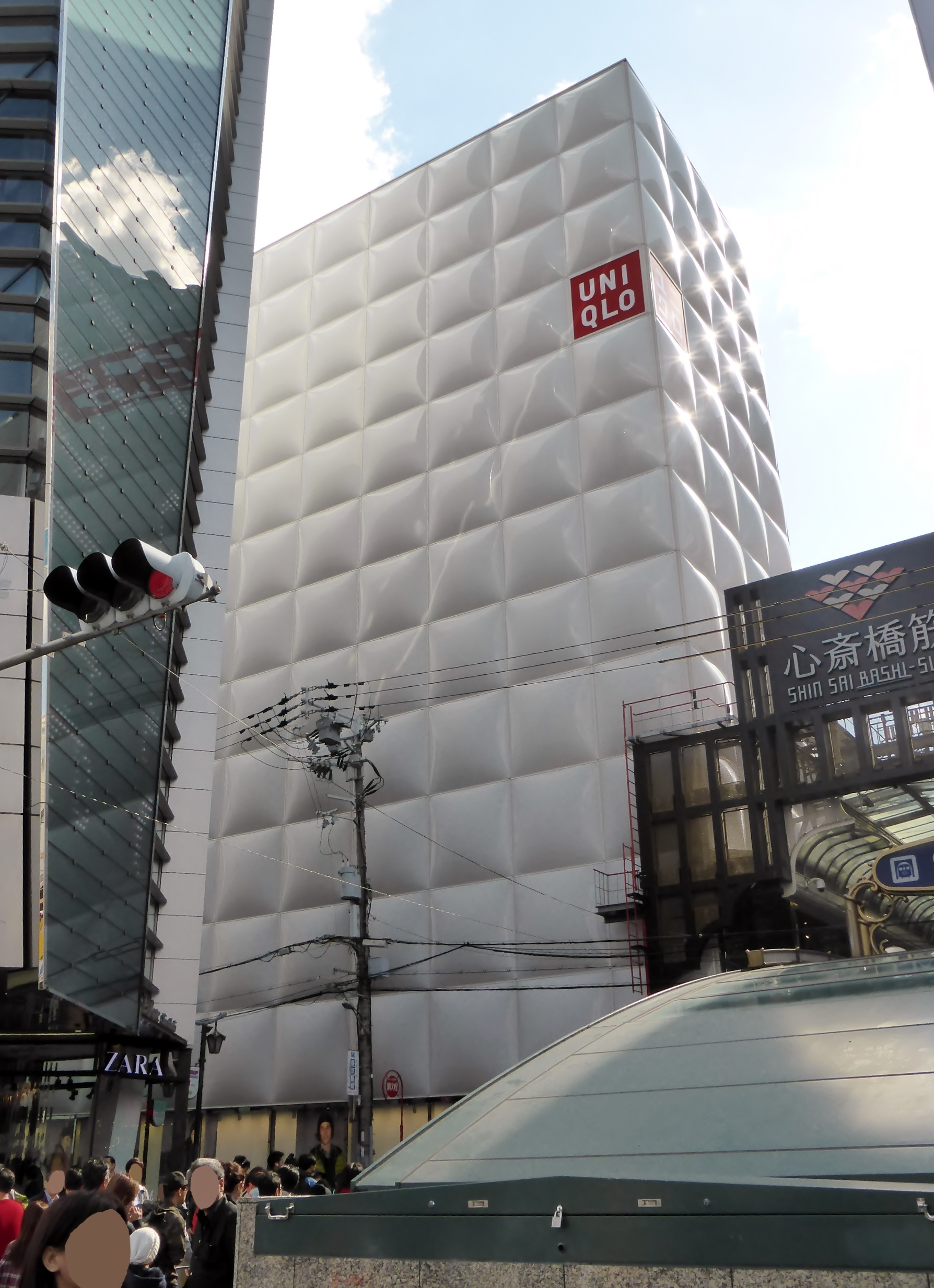 ユニクロ大阪心斎橋店を撮影